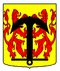 Gemeentewapen Texel